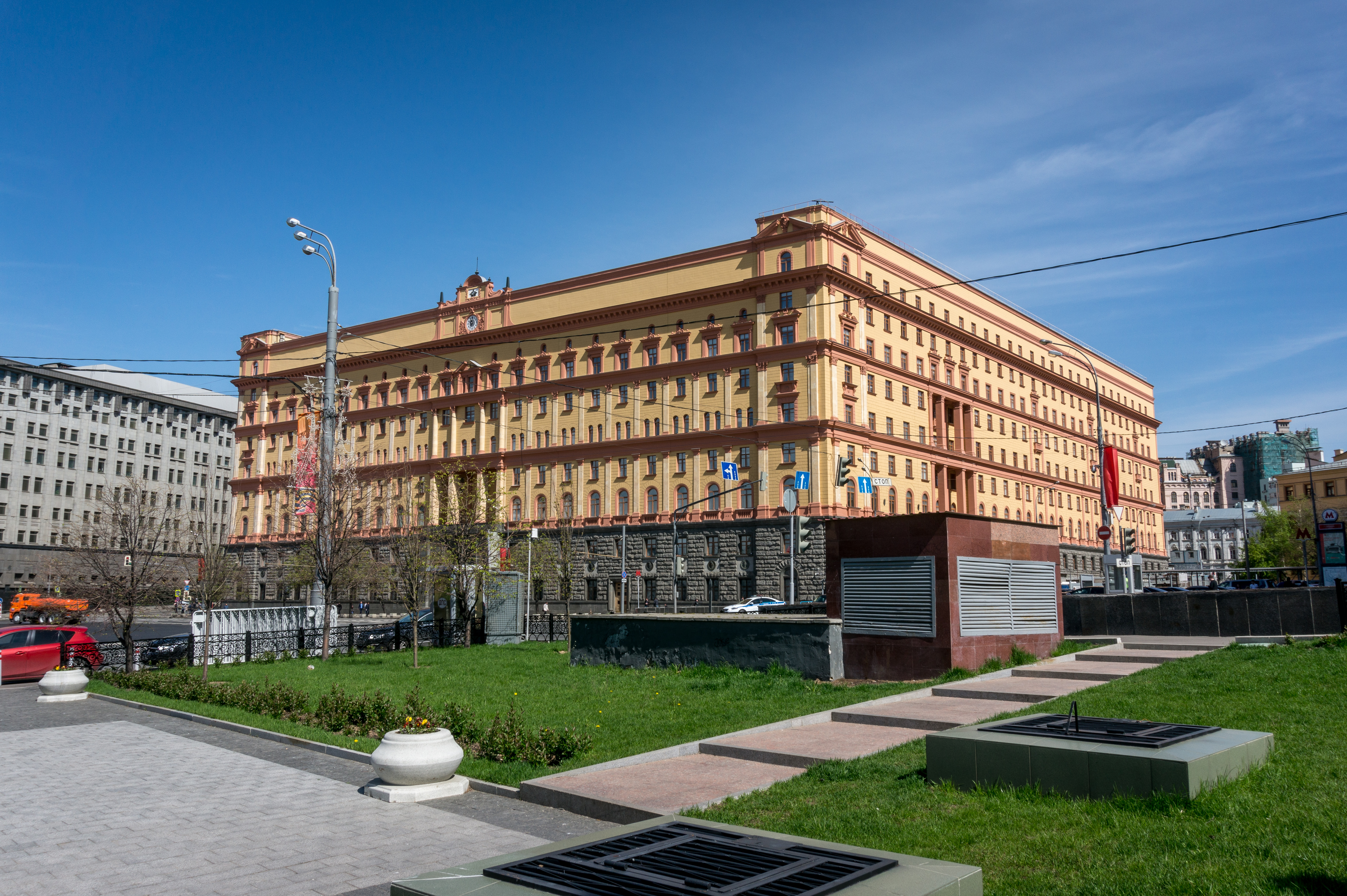 Lubjanka